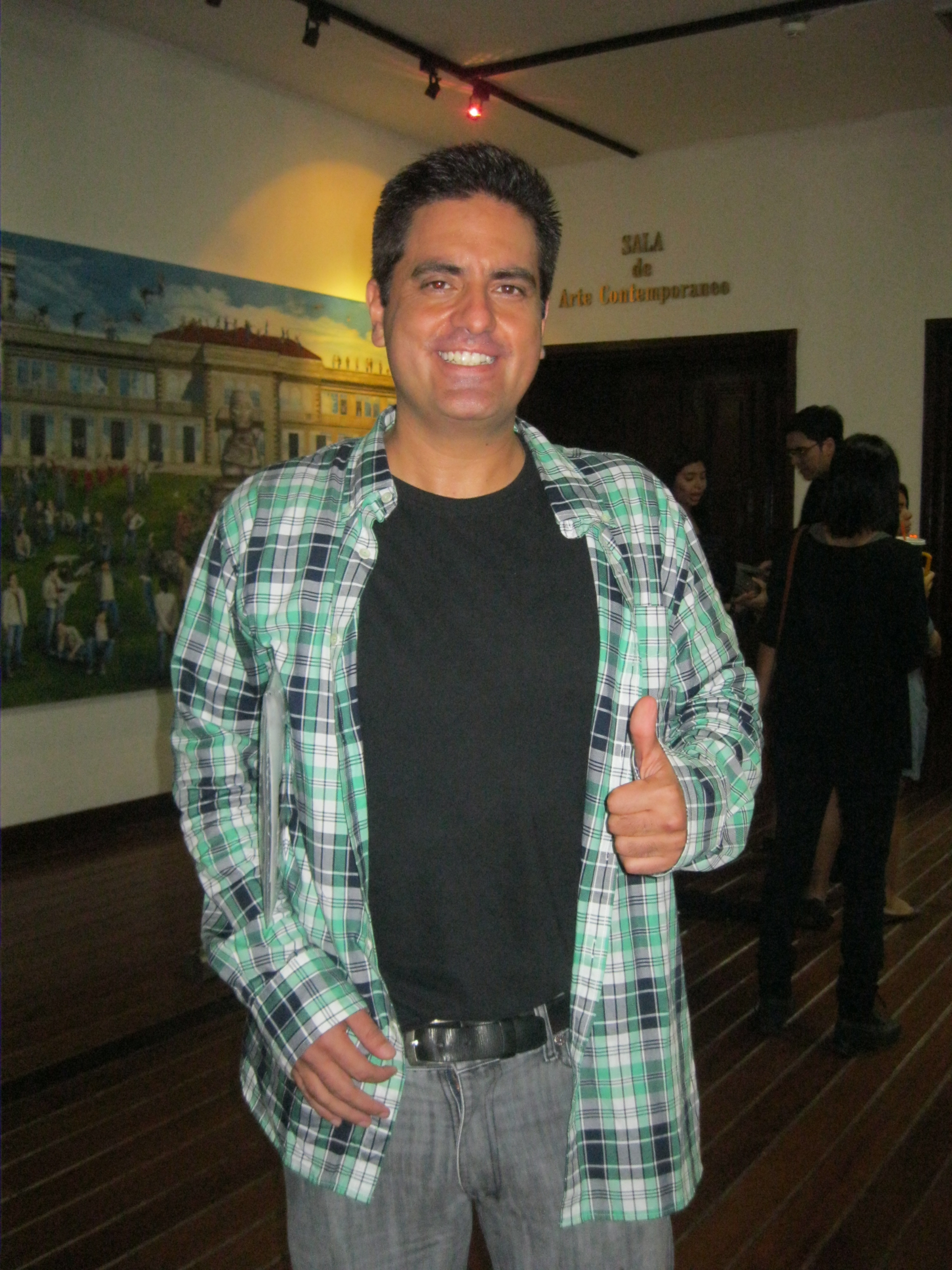 Galo Recalde en una conferencia realizada en el auditorio del Museo Municipal de Guayaquil en 2012.